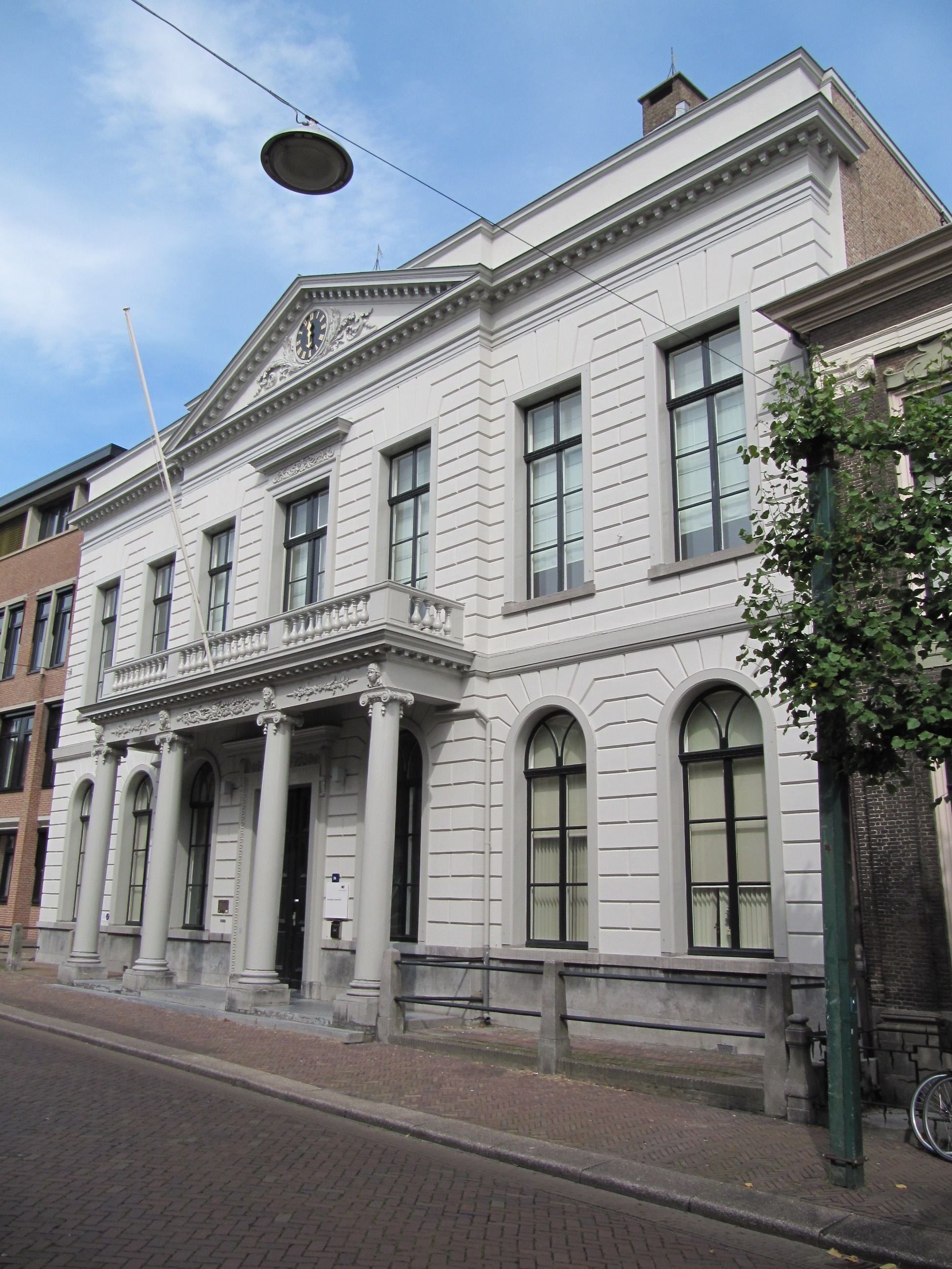 RM13674 Dordrecht - Steegoversloot 36.jpg